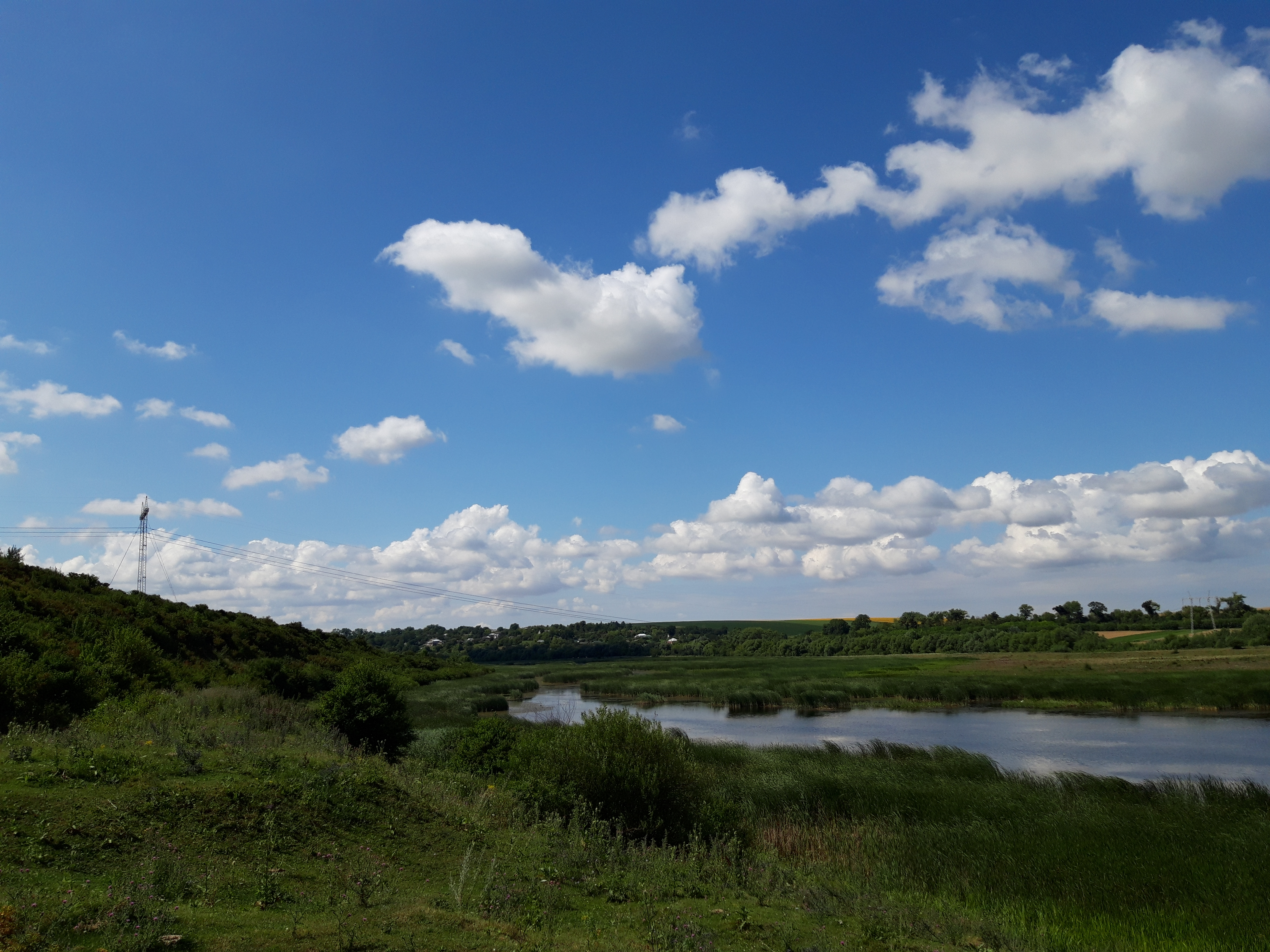 Став біля с. Канівка